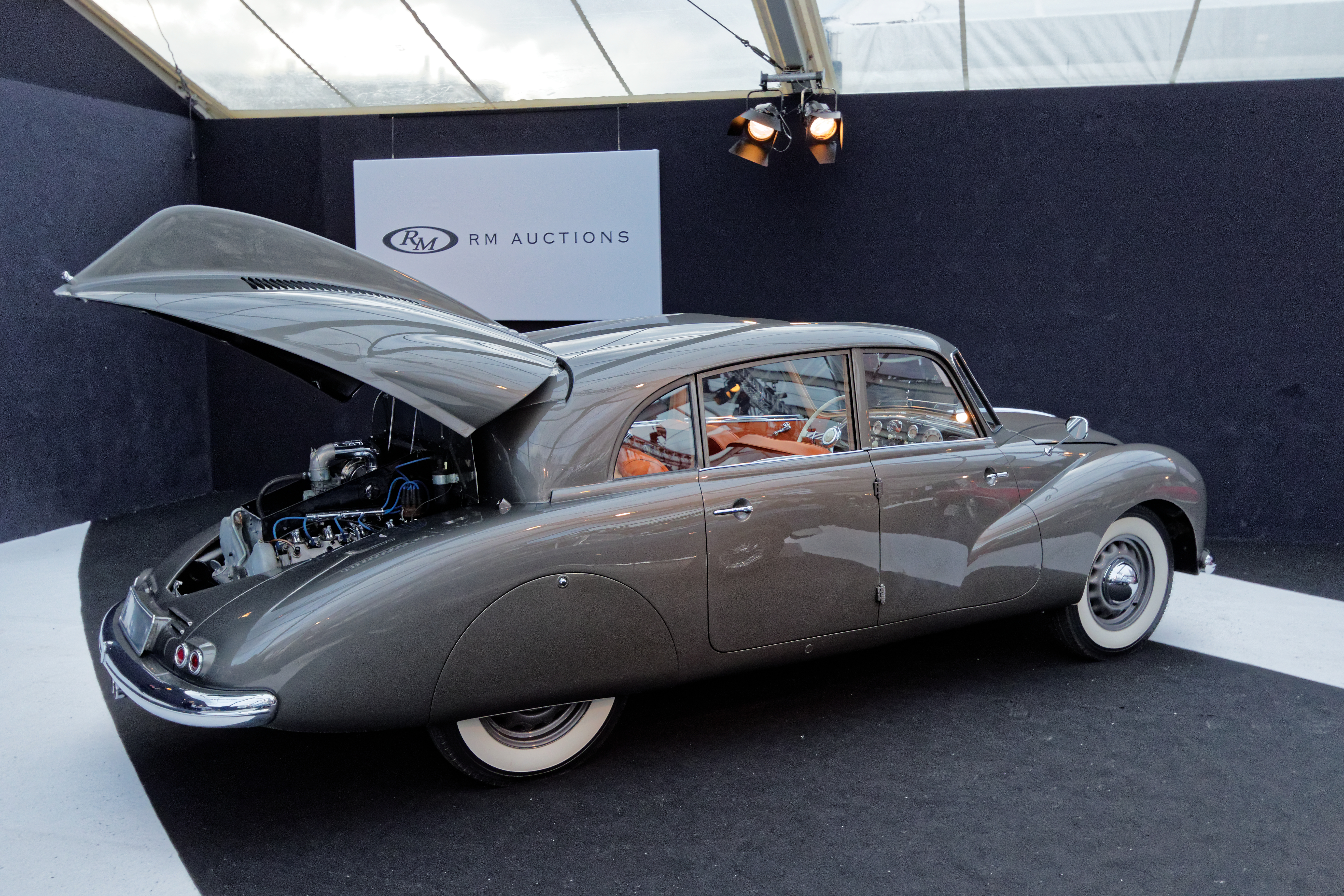 La vente aux enchères RM auctions aux pied des Invalides à Paris le 4 février 2015.